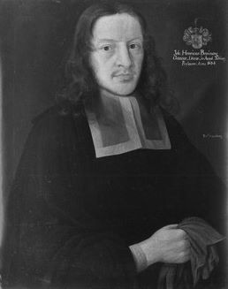 Johann Heinrich Breuning (1650-1686), (Öl auf Leinwand, 75,8x63,0 cm)